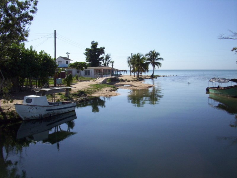 Vista del Río Mayabeque